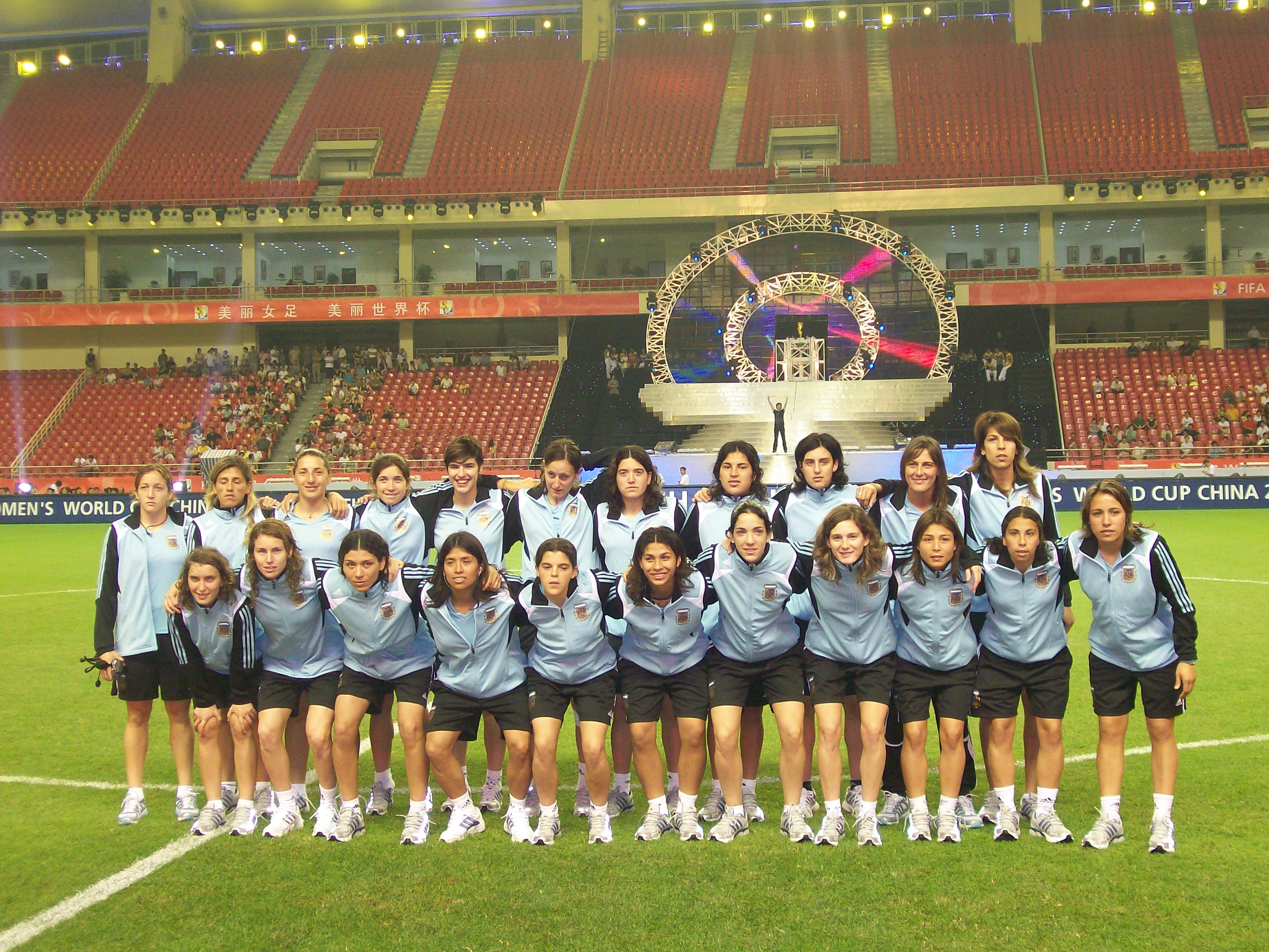 La selección Argentina participaba por segunda vez en un Mundial oficial y participaba por primera vez en un partido inaugural de un Mundial organizado por FIFA